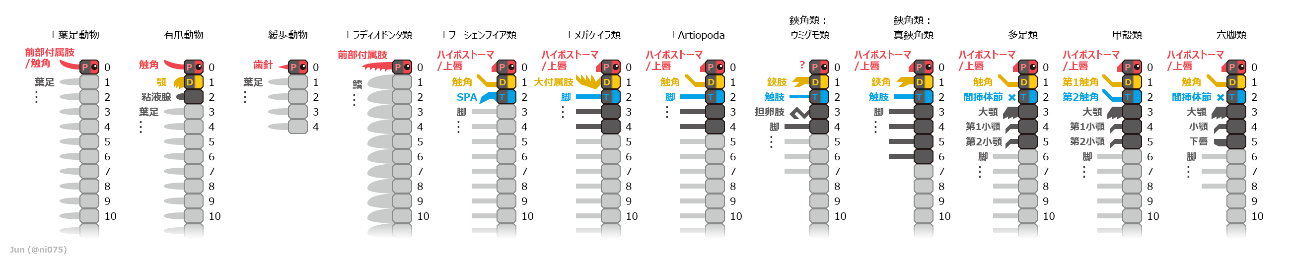 2017年現在で広く認められる見解に基づいた、様々な汎節足動物（葉足動物、有爪動物、緩歩動物、アノマロカリス類、および真節足動物のフキシャンフィア類・Megacheira類・Artiopoda類・鋏角類・多足類・甲殻類・六脚類）における前部の体節と付属肢の対応関係。 眼を備わった最前端の体節（先節、ocular somite）は「0」で示し、直後の10つの体節は図の示す通り。それ以降の節は省略される。 暗灰色：前端の合体節に含まれる体節（真鋏角類の「前体」および残りの群の「頭部」） 赤色/P：前大脳性の体節/付属肢 黄色/D：中大脳性の体節/付属肢 緑色/T：後大脳性の体節/付属肢 現生汎節足動物の版： 真節足動物の版： 参考文献： Origin and evolution of the panarthropod head – A palaeobiological and developmental perspective (May 2017) Segmentation and tagmosis in Chelicerata (May 2017) English